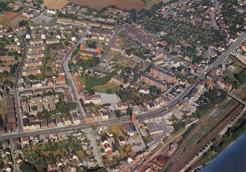 Luftbild von Dortmund-Bövinghausen, Deutschland